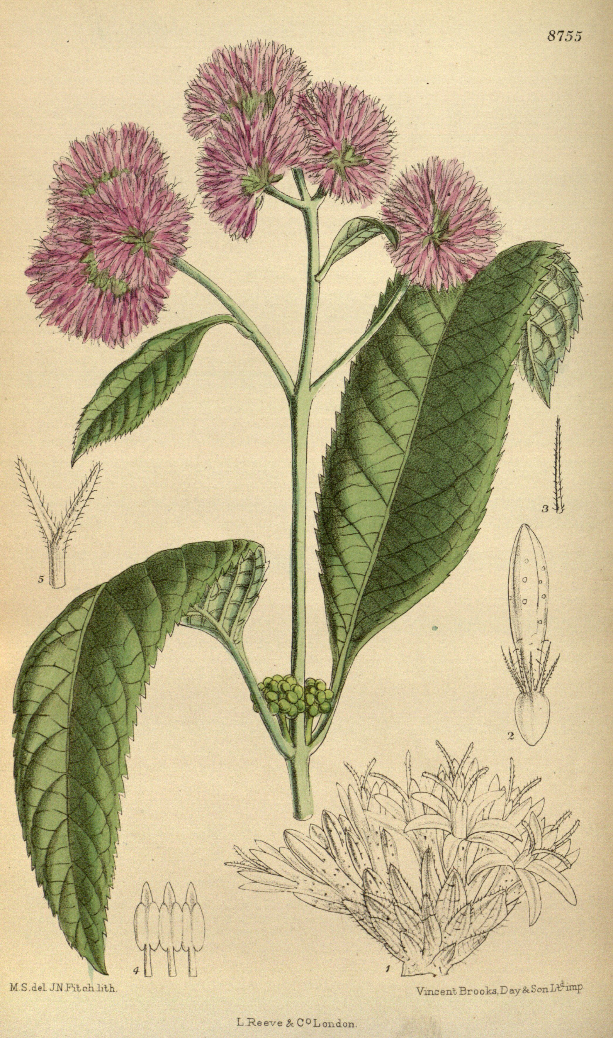 Erlangea aggregata (= Bothriocline aggregata), Asteraceae